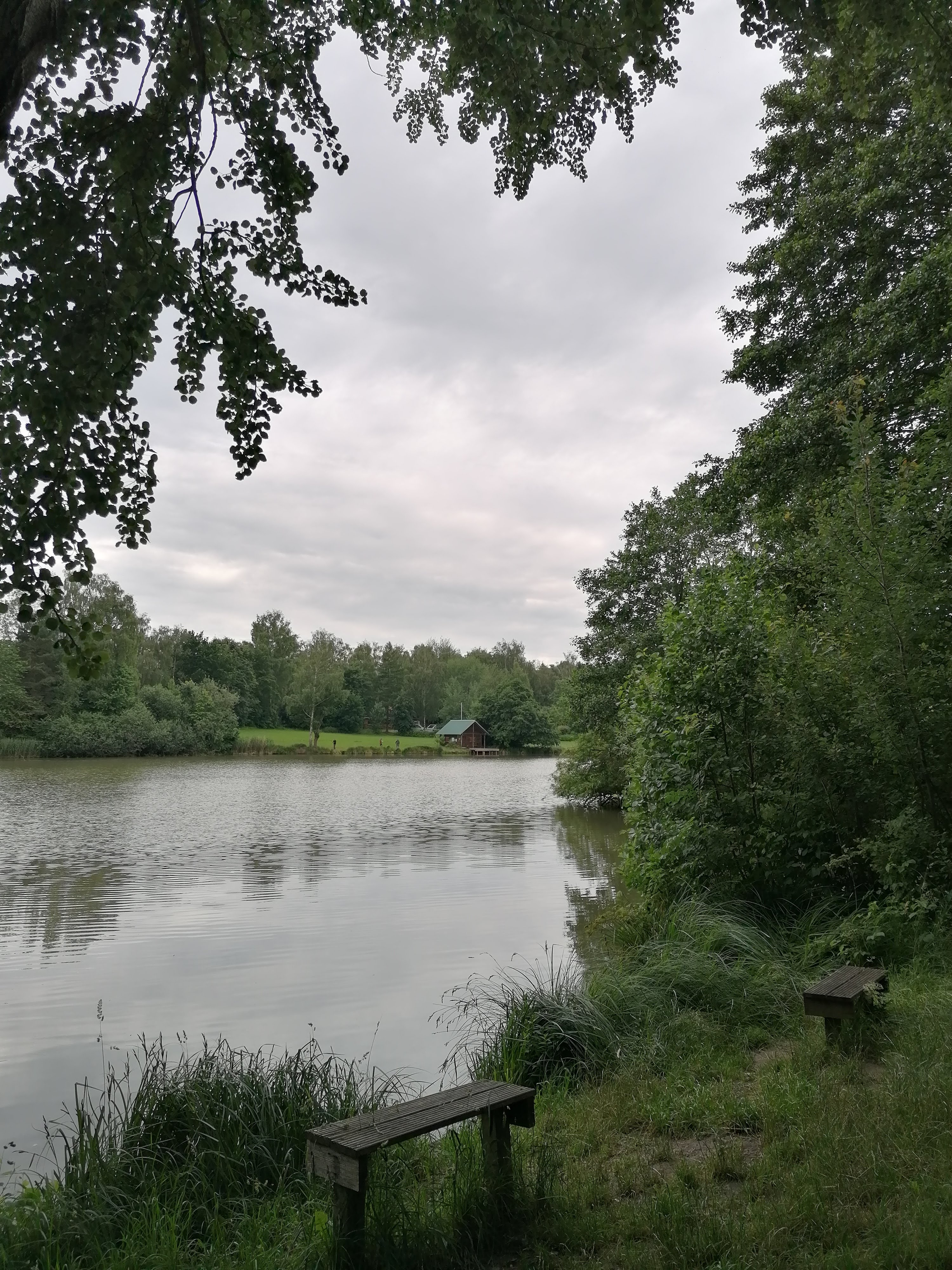 Erlensee mit Blick aud die DRLG-Wachütte